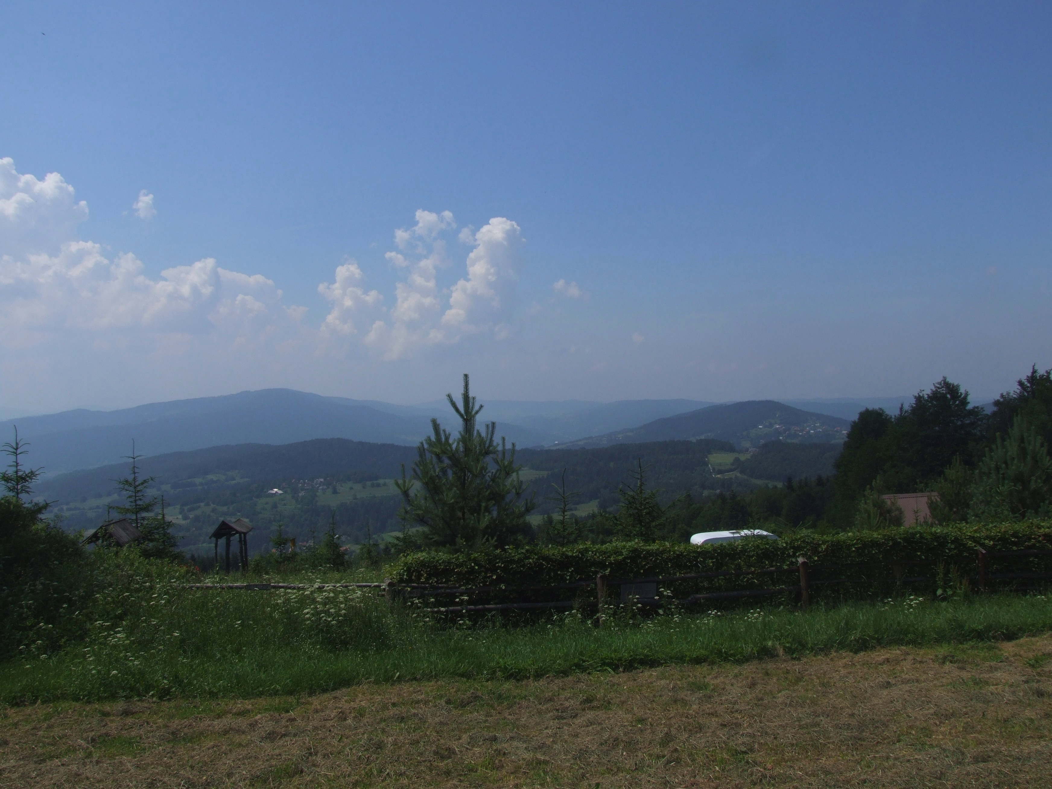 Polana nad Nowinami i panorama widokowa